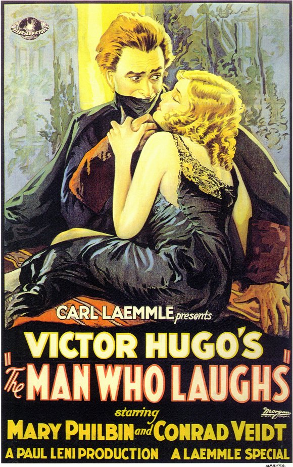 The man who laughs poster film 1928